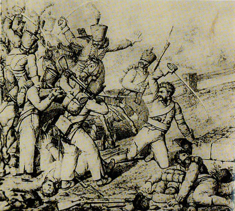 Bataille de Thouars en 1815